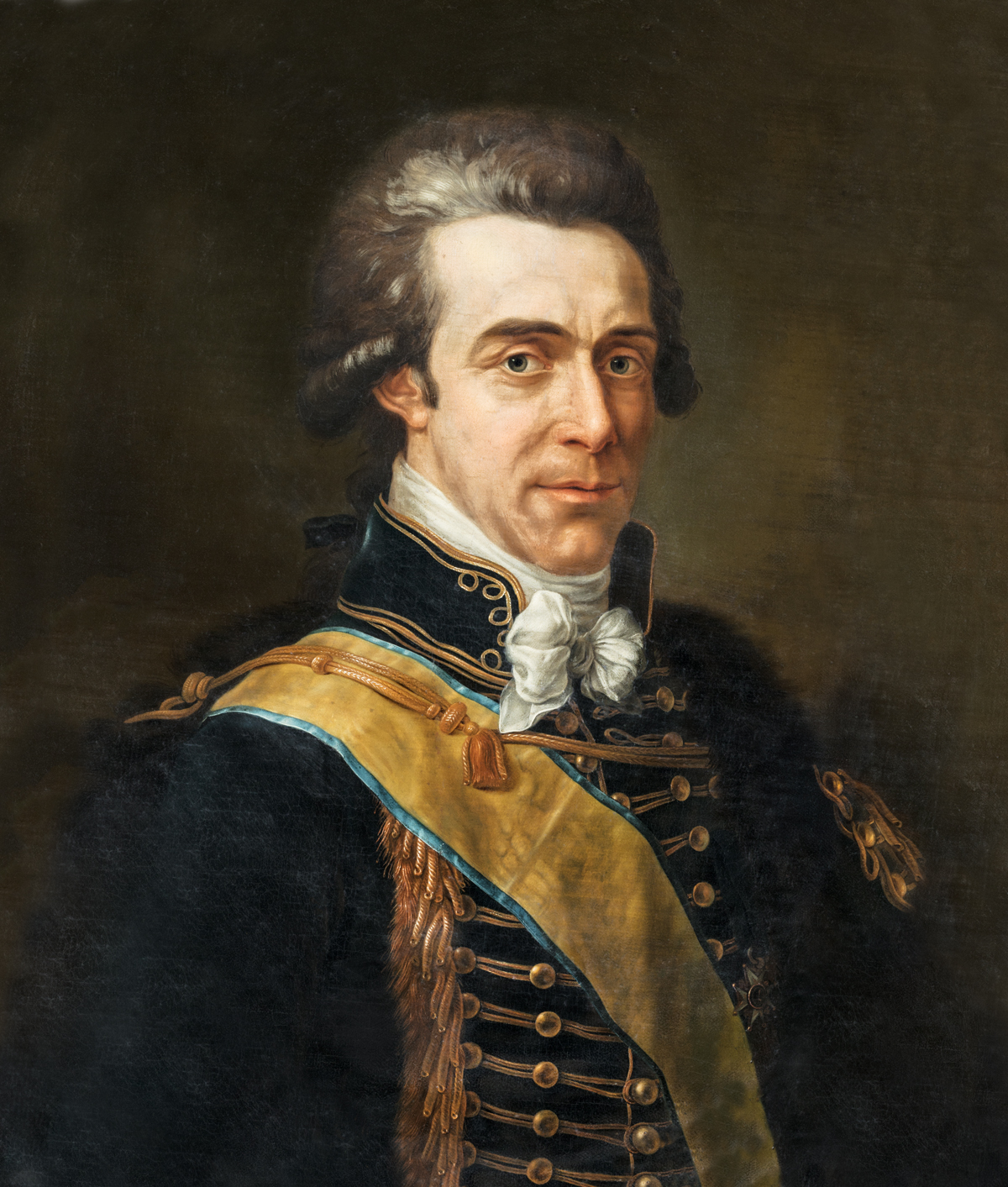 Portrait of Hans Axel von Fersen (1755-1810)